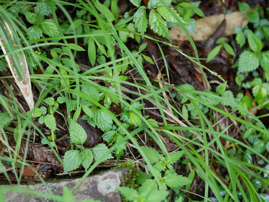 2019/06/09 愛媛県：Ehime Pref., Japan